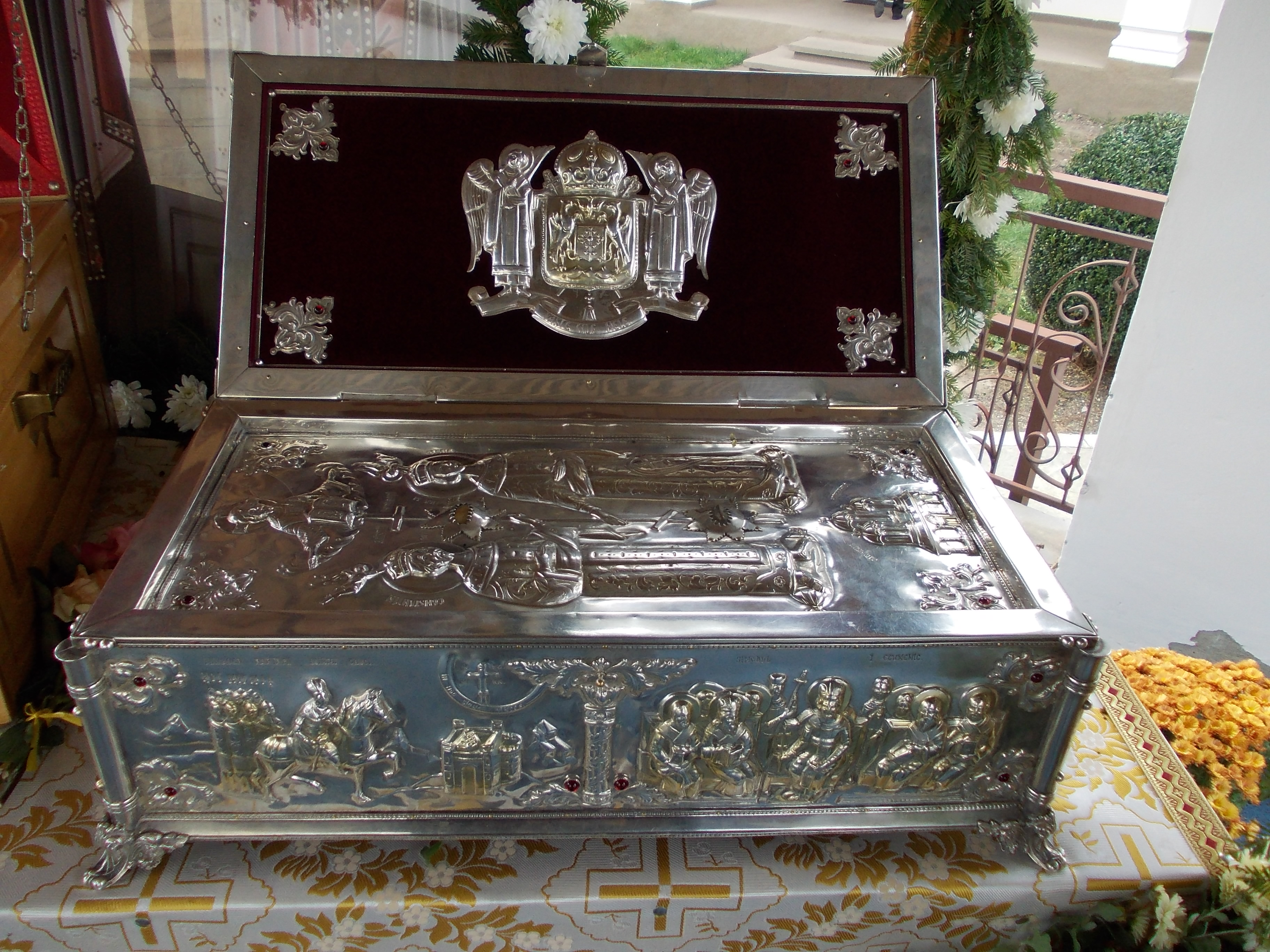 Racla cu moaştele sfinţilor împăraţi Constantin şi Elena, expusă la Arhiepiscopia Romanului şi Bacăului